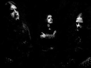 Frozen Band